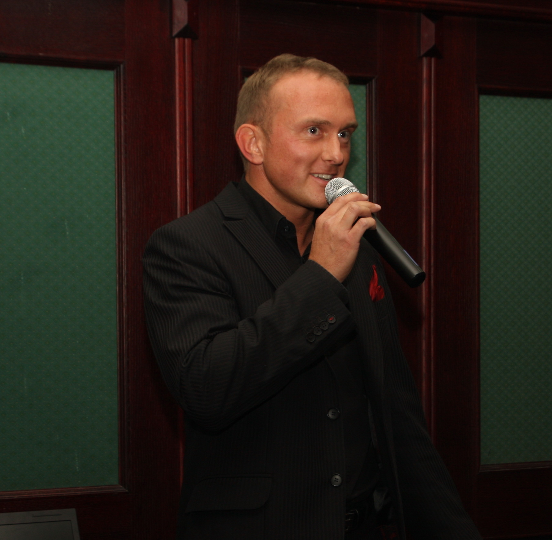 Vladimír Kruliš na setkání s občany, Zlín, 29. říjen 2011